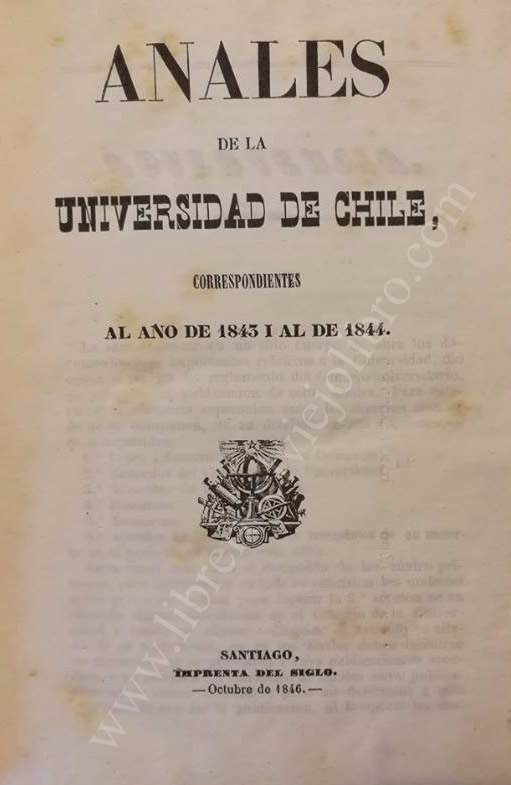 Anales de la Universidad de Chile, correspondientes al año de 1843 y al de 1844. Octubre de 1846. 446 paginas, Primera Edición.